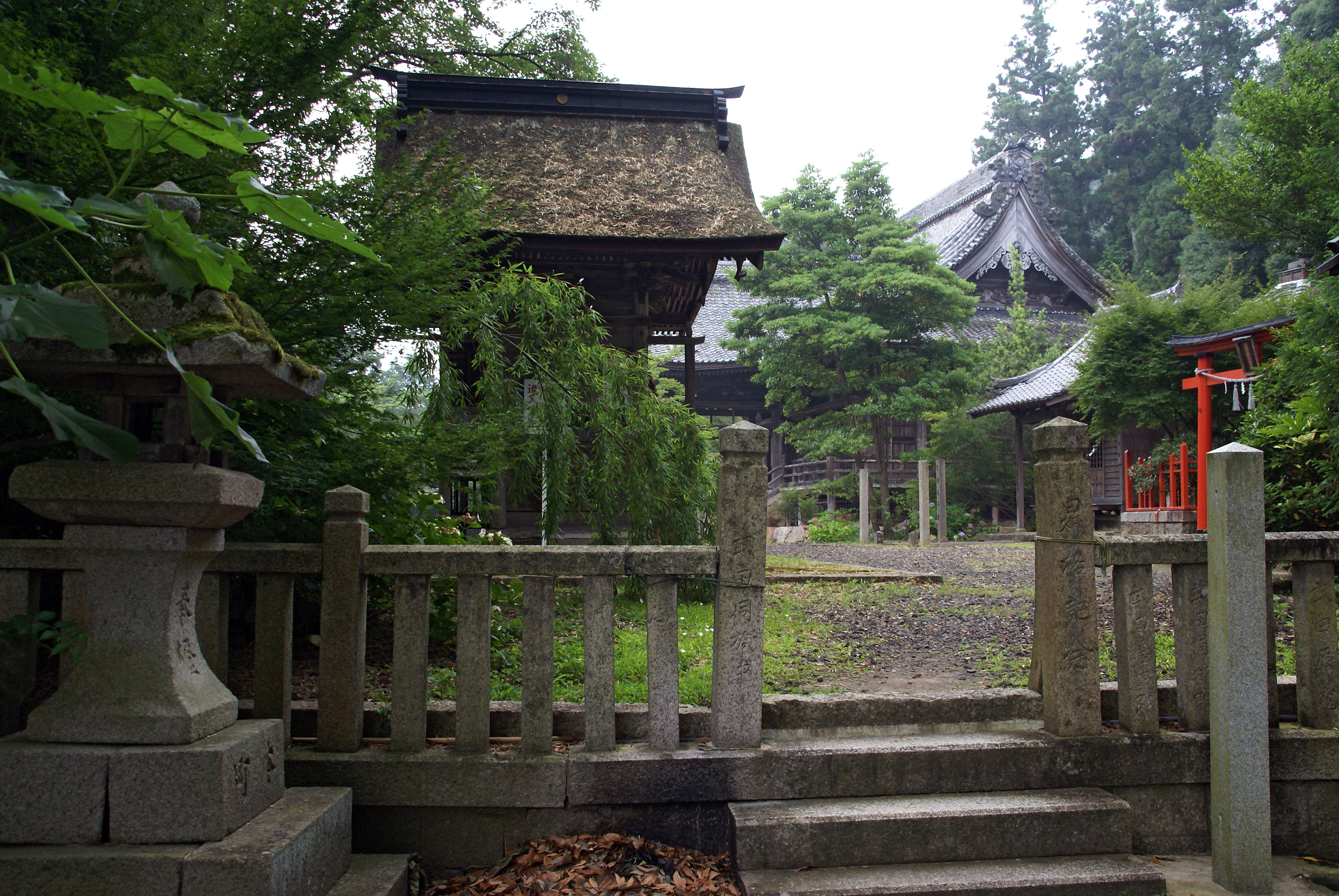 Asashiro-jinja in Maizuru, Kyoto prefecture, Japan